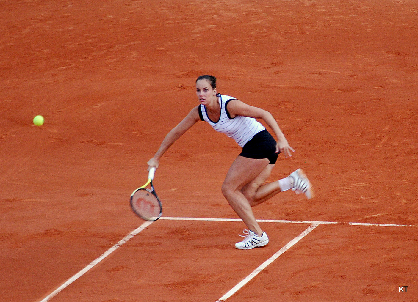 Roland Garros 2011